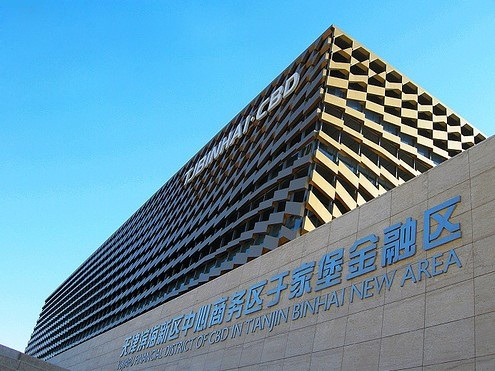 天津滨海新区于家堡金融区管委会